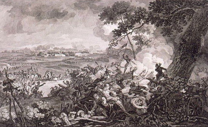 Bataille d'Enzheim, Turenne 4 octobre 1674. Bibliothèque nationale et universitaire de Strasbourg